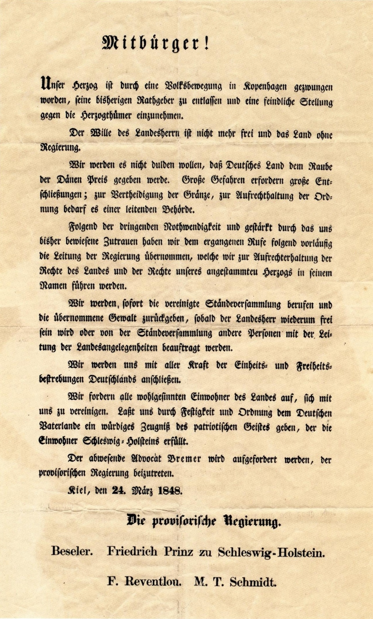 “Mitbürger!” Aufruf der provisorischen Regierung Schleswig-Holsteins vom 24. März 1848